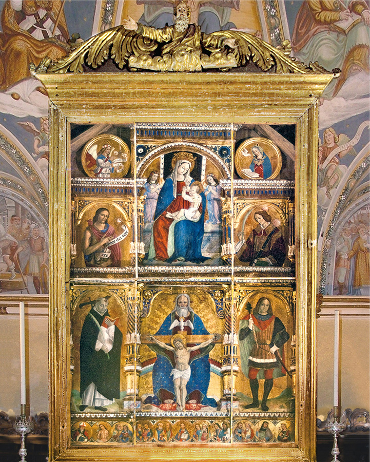 il Polittico del Marinoni al santuario della Santissima Trinità di Casnigo.